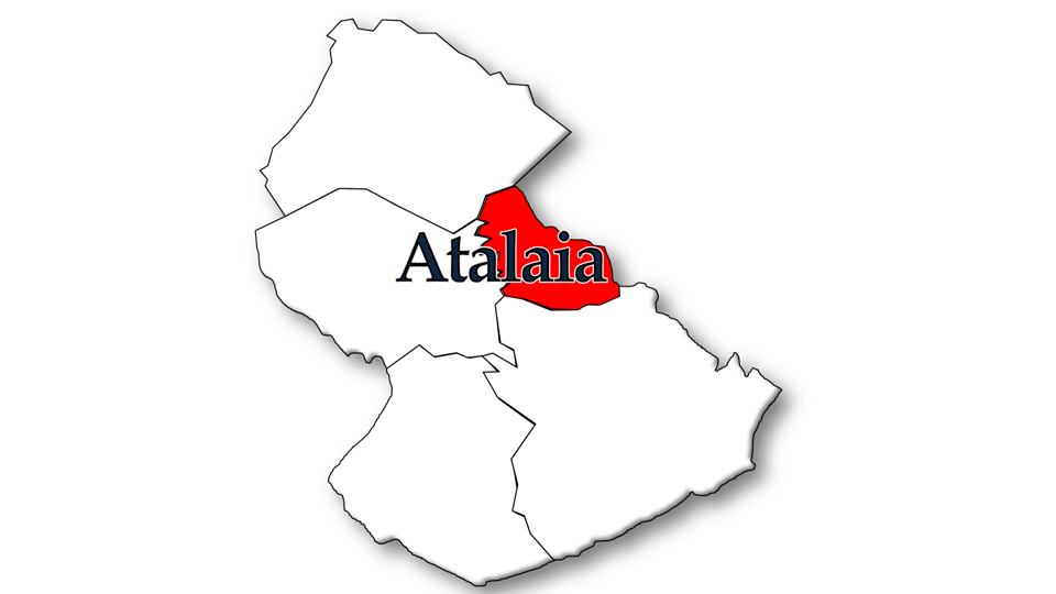 Evolução da População